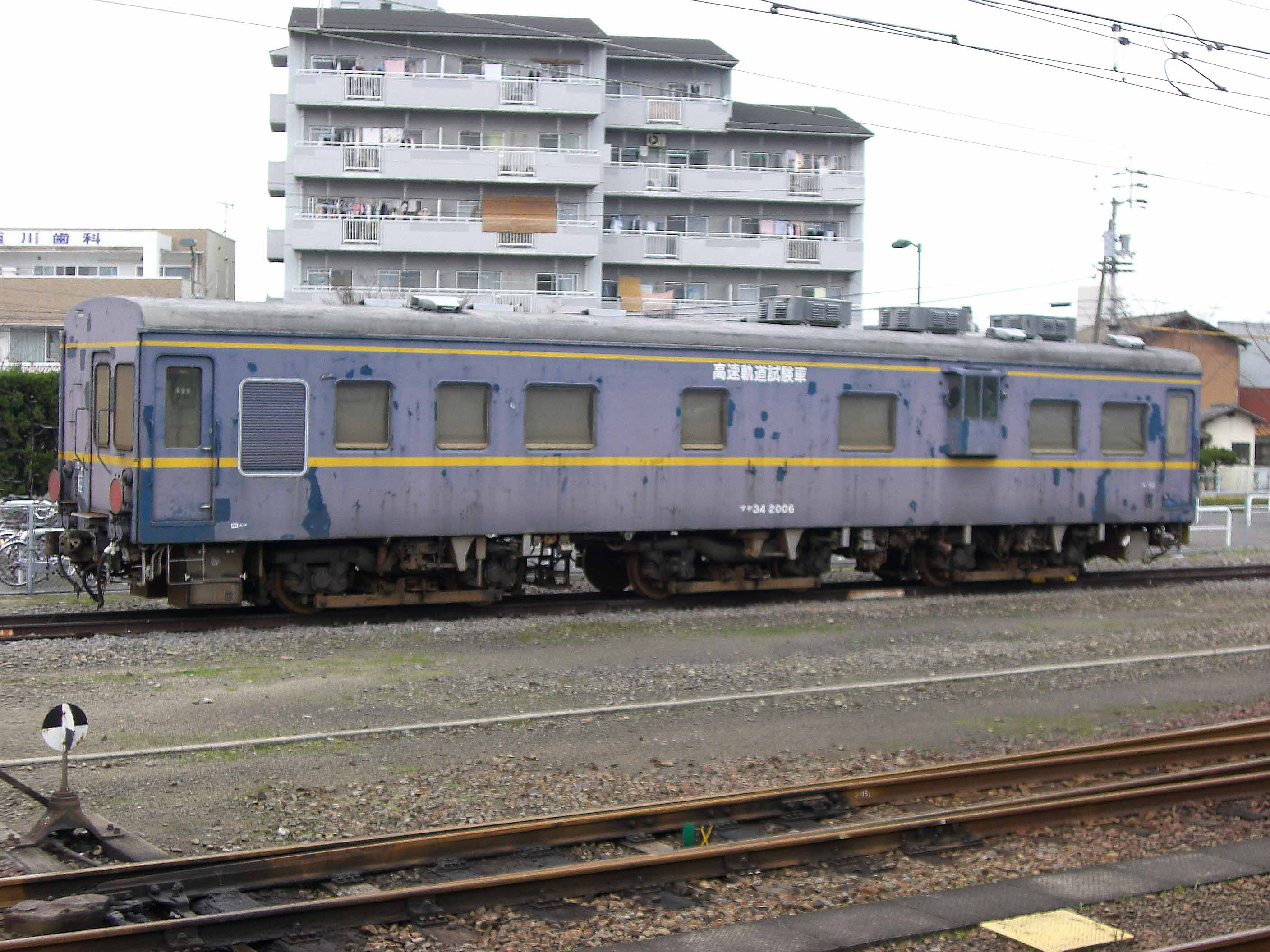 四国旅客鉄道マヤ34形2006。多度津駅にて